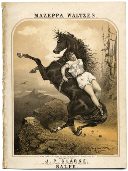 Ілюстрація до кантати Майкла Вільяма Балфа «Мазепа»